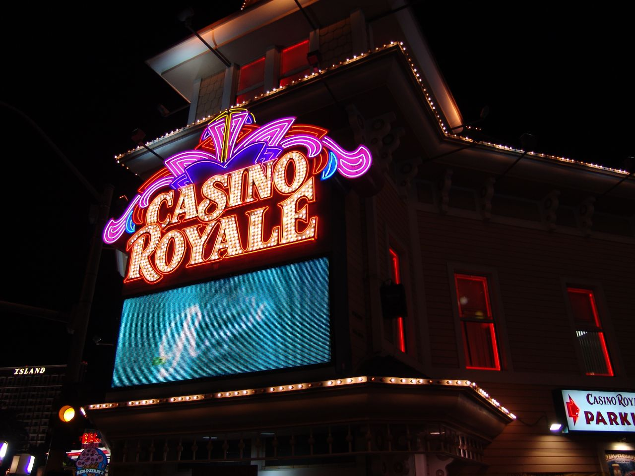 Casino Royale en Las Vegas